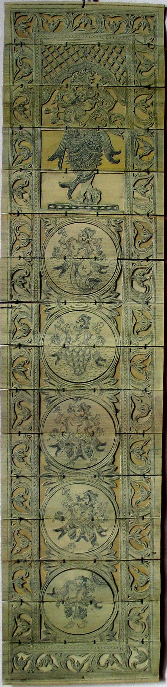 Peinture Talapata Chitra - Talapata Chitra Painting